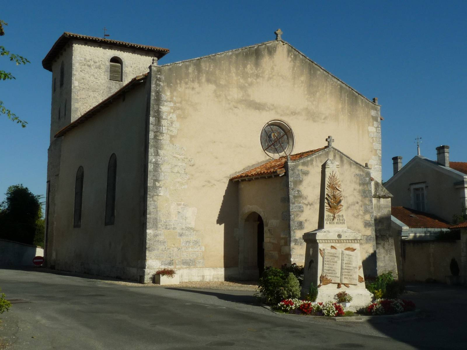 église de St-Paul-Lizonne (24), France Object location45° 19′ 11.4″ N, 0° 16′ 53.8″ E